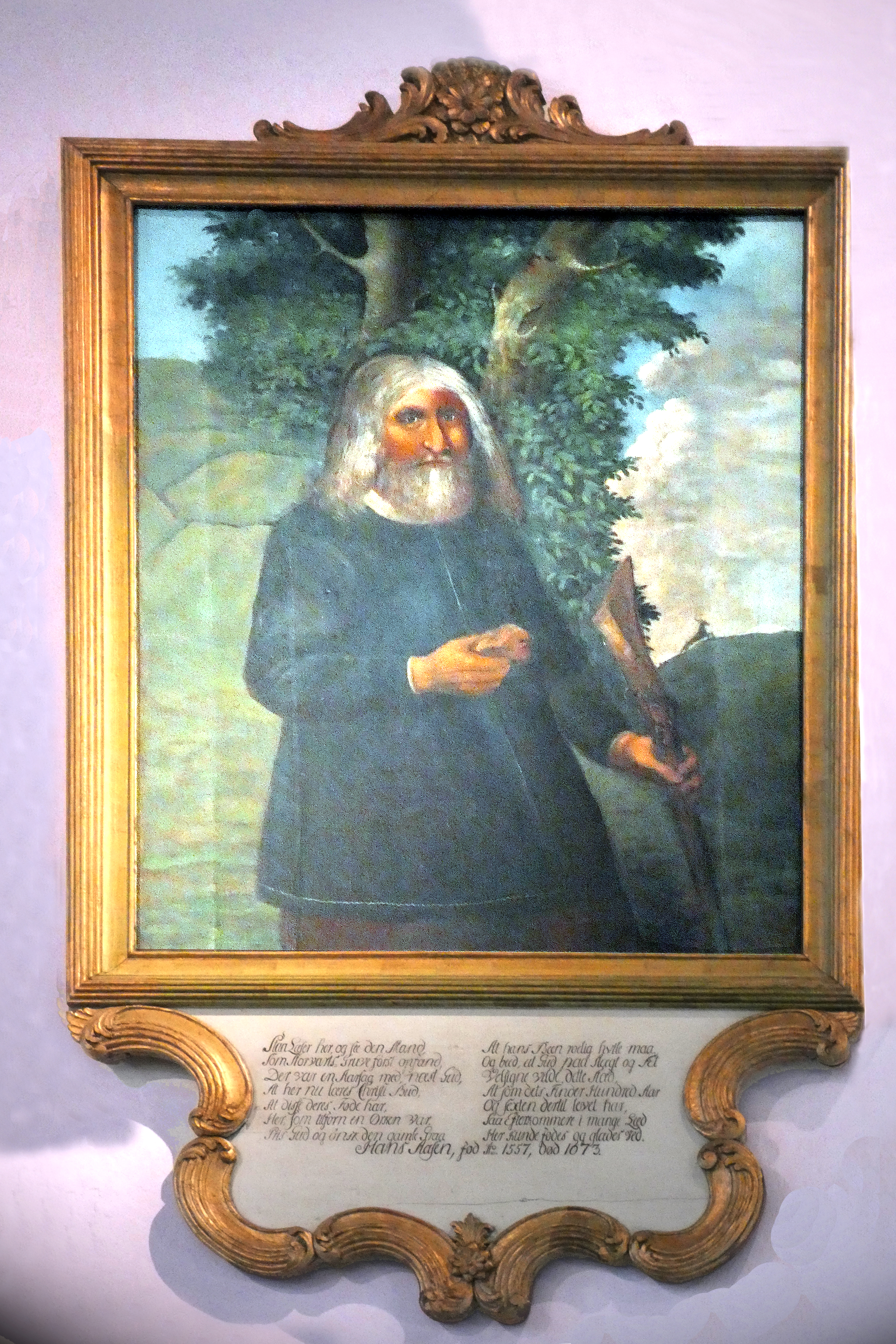 Bilde av maleriet av Hans Aasen i Røros Kirke, avfotografert ved besøk i kirken den 30.sept.-2017.